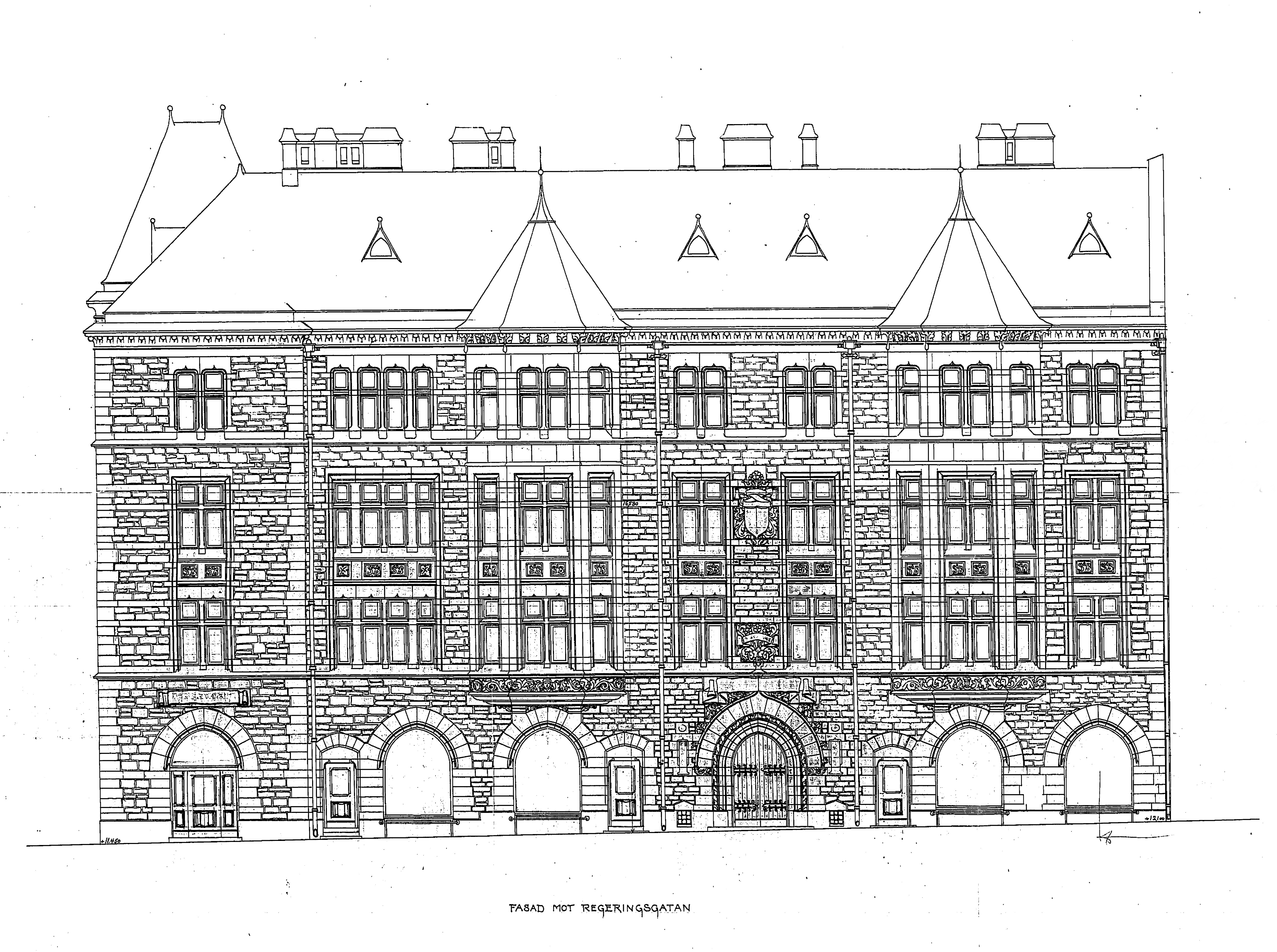 Fasadritning till Vätan 22 (mot Regeringsgatan)